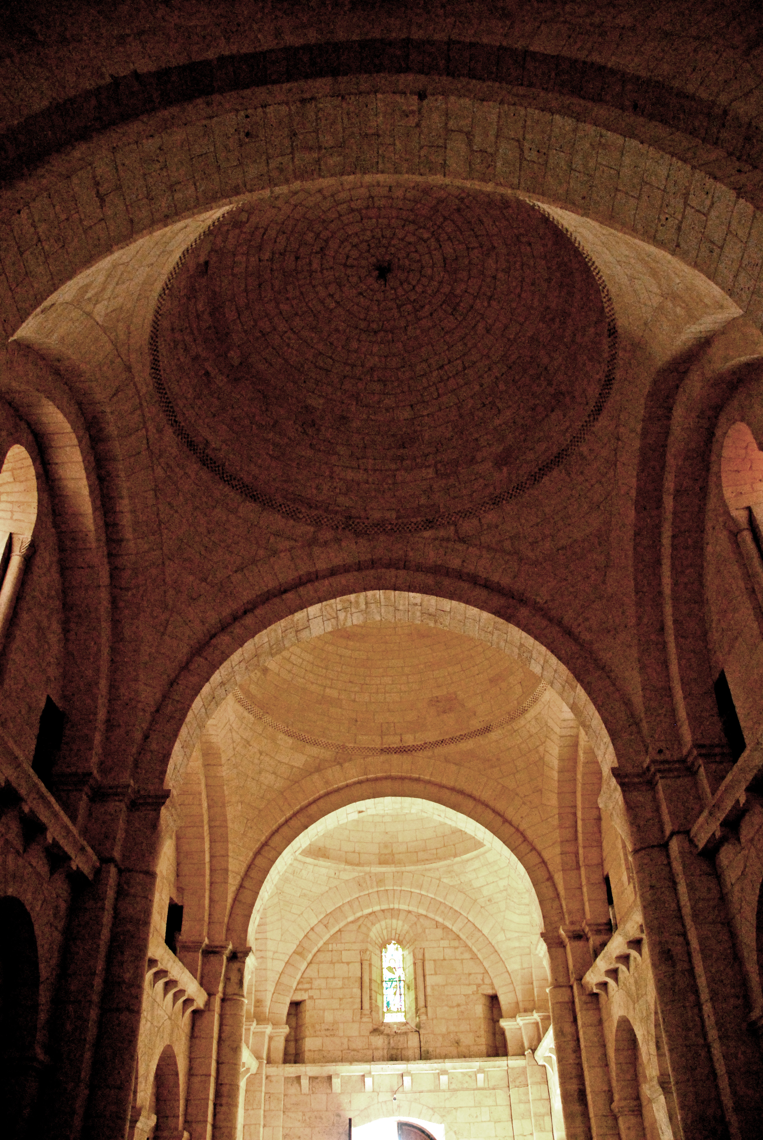 Genzac-la-Pallue, Schiff, aus 4. Joch nach hinten, Wehrgänge